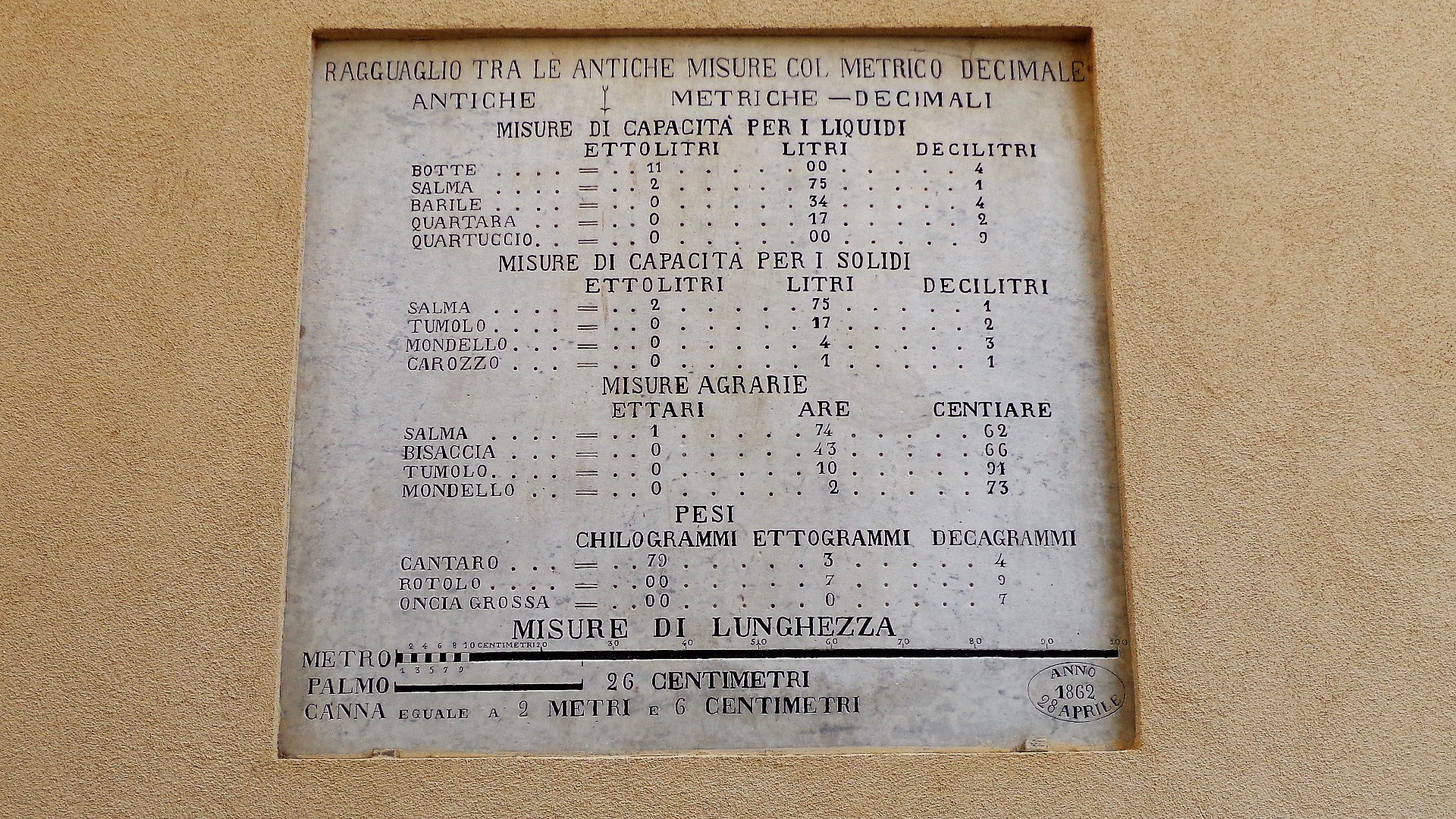 Targa equivalenza misure.